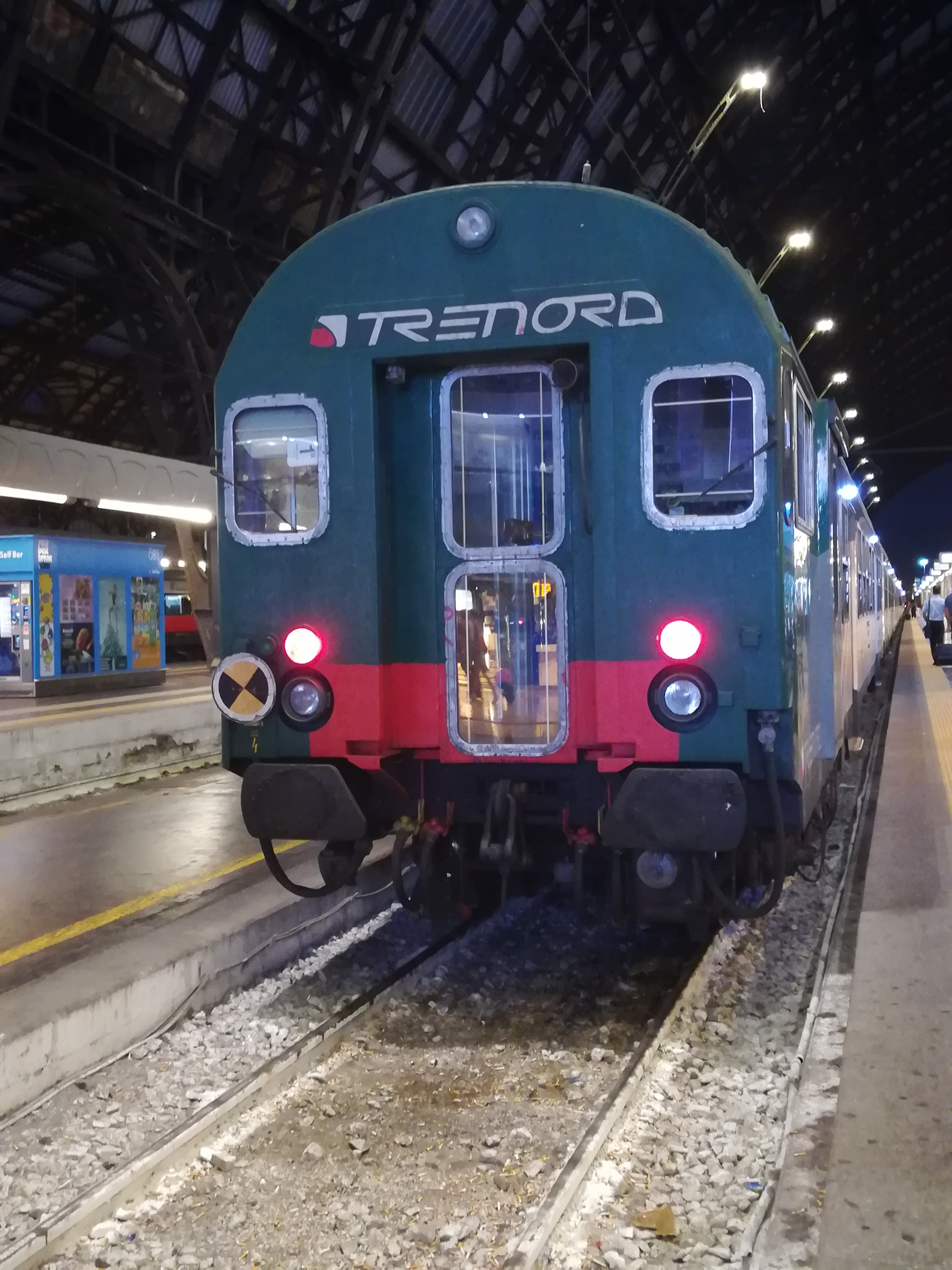 La testata di una semi pilota MDVC ex- passante, privata degli elementi di intercomunicazione per i viaggiatori fotografata a Milano Centrale